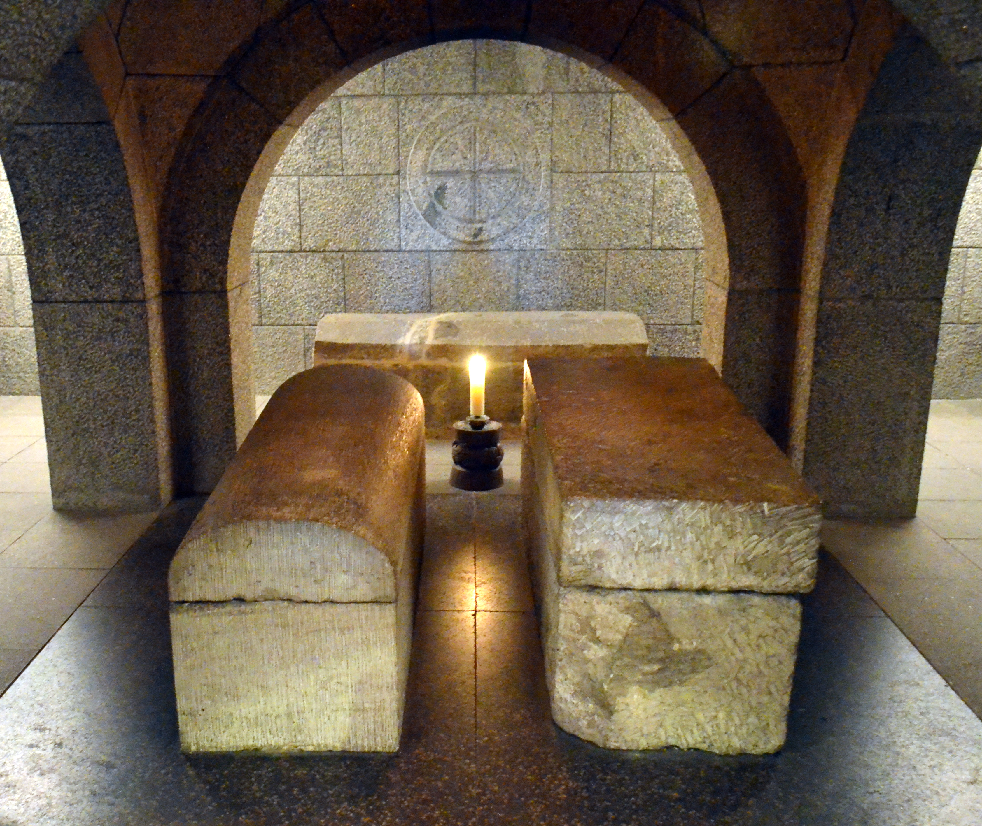 Braunschweig, Braunschweiger Dom: Krypta Heinrichs des Löwen. Links: Sarkophag Heinrichs des Löwen, rechts: Sarkophag seiner zweiten Ehefrau Mathilde Plantagenet. Im Hintergrund ein Sarkophag, in dem sich die sterblichen Überreste mehrerer Brunonen befinden, nämlich: Markgräfin Gertrud († 1077), die um 1030 die erste Domkirche gegründet hatte, Markgraf Ekberts II. von Meißen, und Gertruds von Braunschweig, Schwester Ekberts II. und Urgroßmutter Heinrichs des Löwen. Die Krypta Heinrichs des Löwen wurde erst auf Weisung Adolf Hitlers zwischen 1936 und 1938 von den Architekten Walter und Johannes Krüger geschaffen.